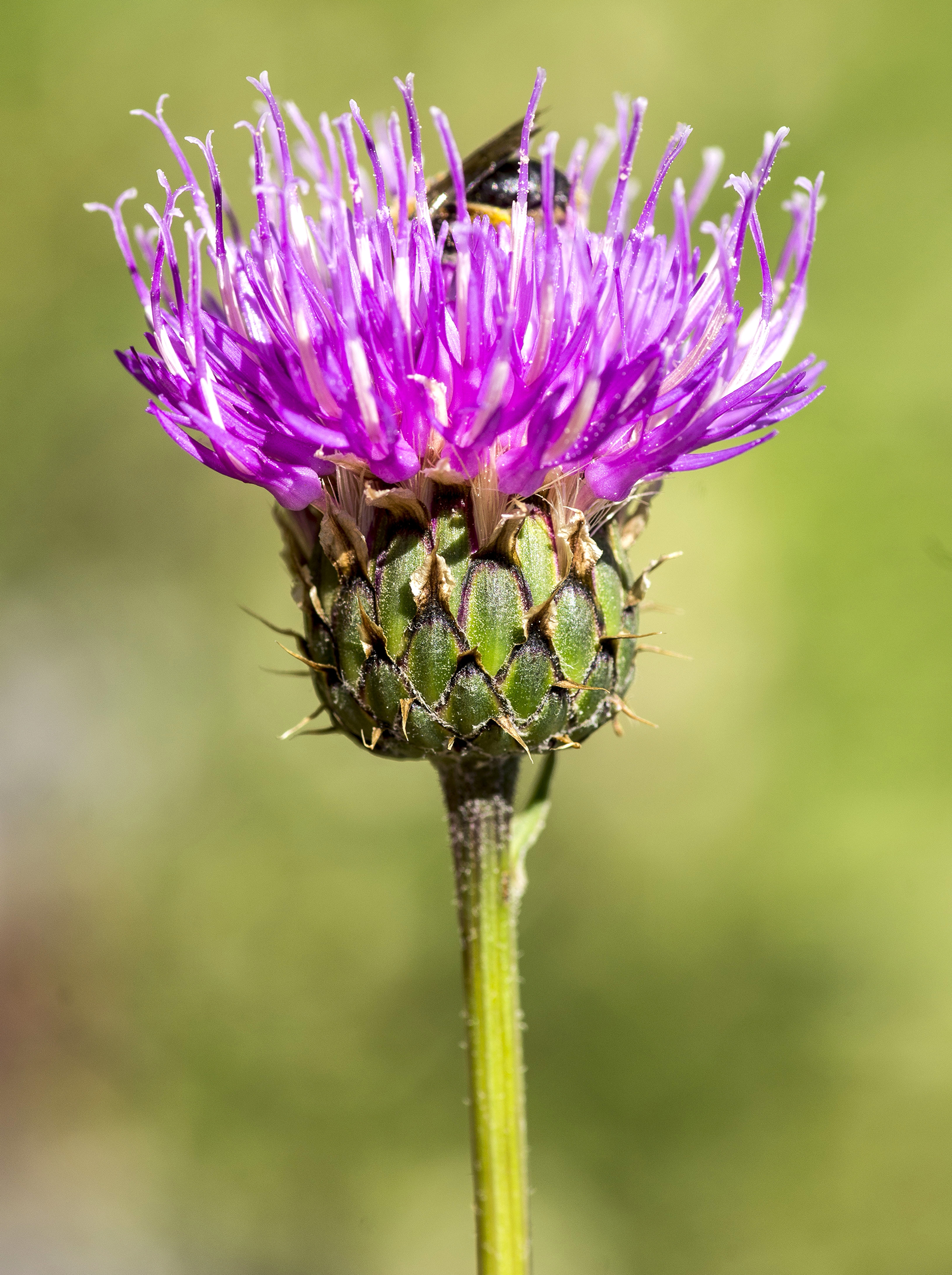 Klasea nudicaulis - Capítulo en antesis. - Treschenu-Creyers (Departamento de la Drôme, Francia).